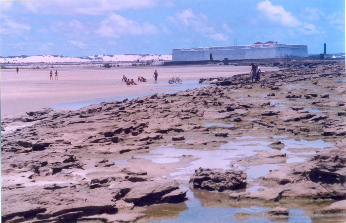 Forte dos Reis Magos - Rio Grande do Norte